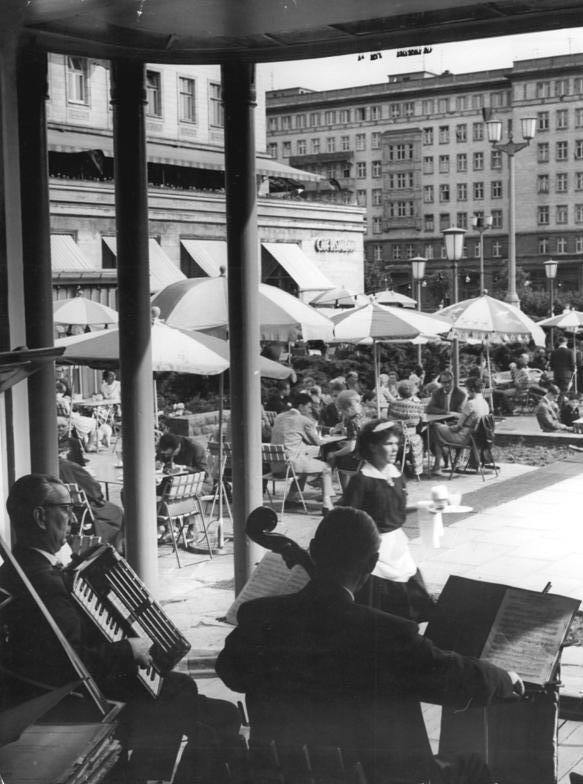 Berlin, Karl-Marx-Allee, Café "Warschau", Orchester Zentralbild Weiß 29.5.1963 "Der Berliner liebt Musike" Sonntagnachmittags im Gartenrestaurant des Cafe` Warschau in der Karl-Marx-Allee.